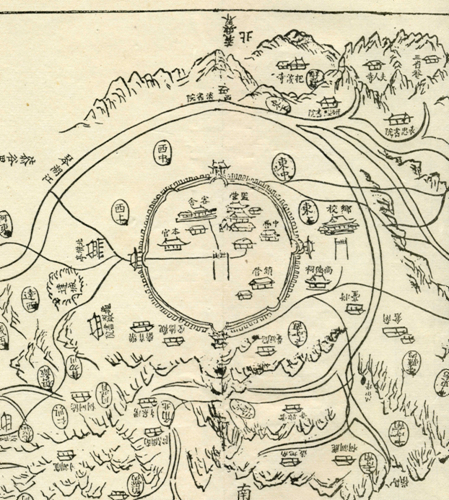 대구부 고지도